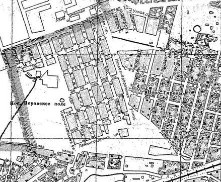 Посёлки Перово поле и Новогиреево на довоенном плане Москвы 1940 года. "План города Москвы". Ред.Алферова Н. В.